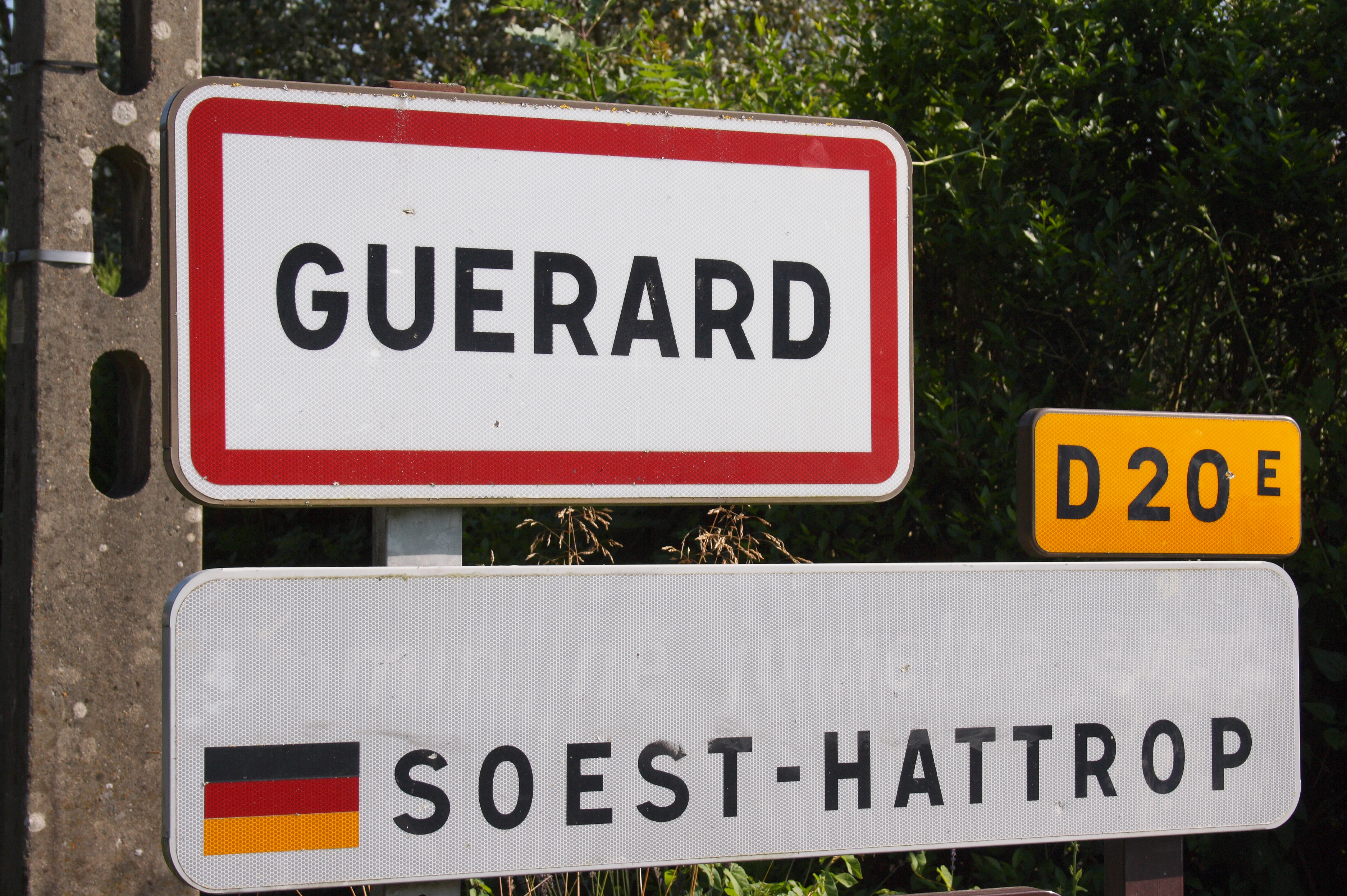 Ortsschild von Guérard im Département Seine-et-Marne in der Region Île-de-France (Frankreich), Partnerstadt von Soest-Hattrop